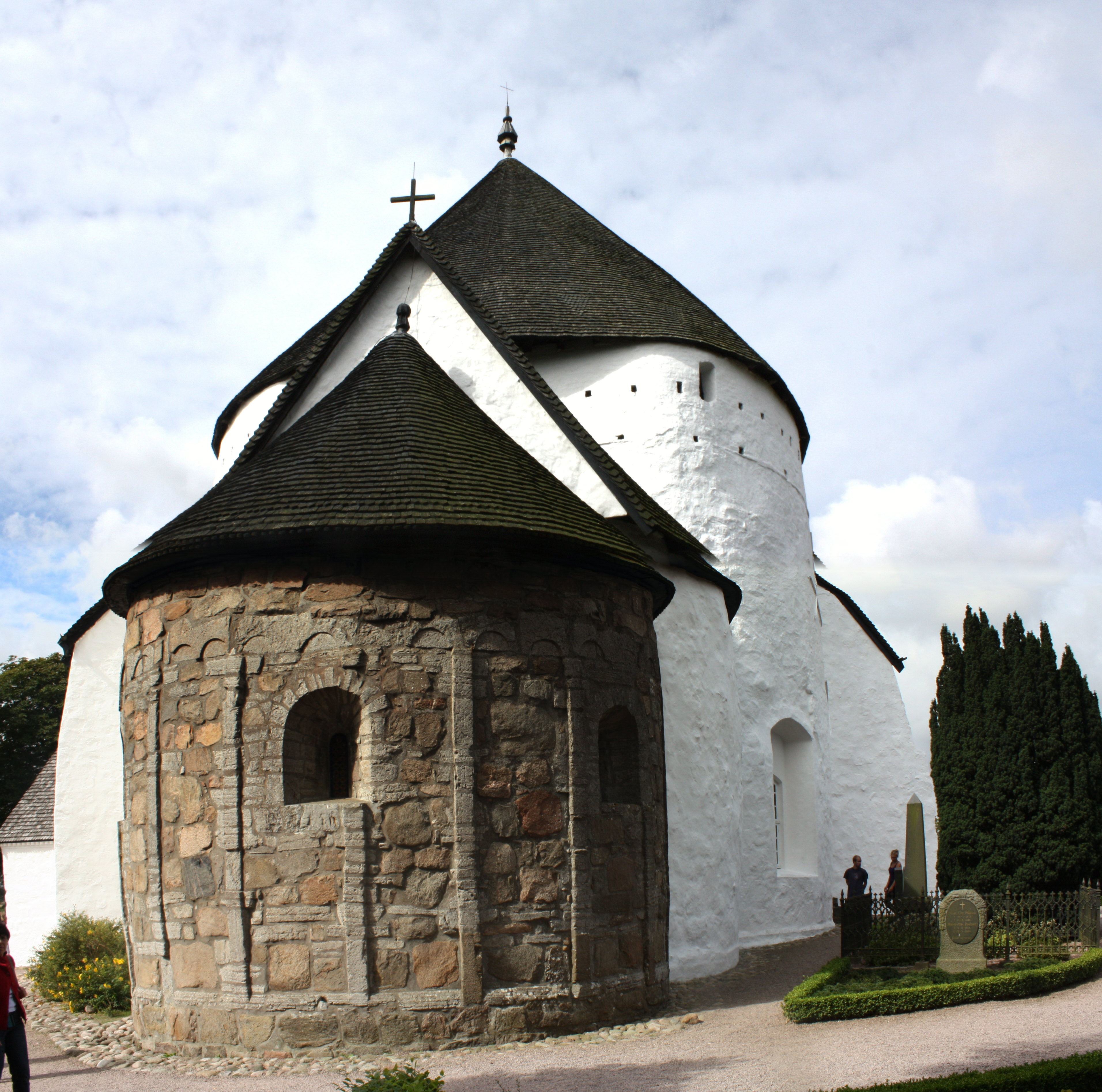 Østerlars kirke , Bornholm, August 2009